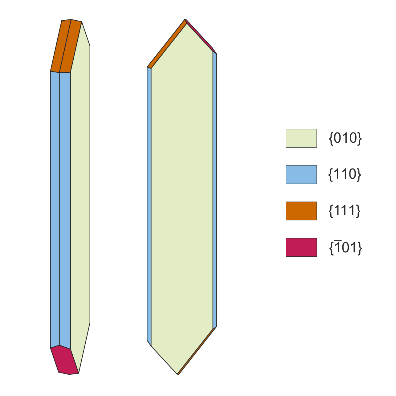 Zeichnung von Stibioclaudetit-Kristallen unter Zugrundelegung einer Vorlage von Marcus J. Origlieri et al. (2009): Stibioclaudetite, AsSbAs3 a new mineral from Tsumeb, Namibia, The Mineralogical Record Vol. 40 (3), S. 211. Links Normalaufstellung, rechts Blick auf die c-Achse [010].